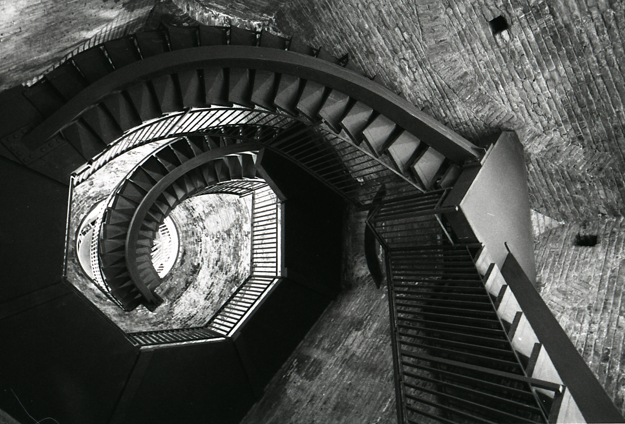 Servizio fotografico : Verona, 1972 / Paolo Monti. - Strisce: 3, Fotogrammi complessivi: 16 : Negativo b/n, gelatina bromuro d'argento/ pellicola ; 35 mm. - ((Sul portanegativi: NIKMAT FP4. - All'interno del portanegativi: la prima striscia, vuota, è contrassegnata da una "X" manoscritta a pennarello nero che identifica la serie. - Occasione: Documentazione per la pubblicazione: Brugnoli Pier Paolo, "Nella bella Verona", Bologna, Cappelli, 1972. - Fonte: Agenda di Paolo Monti: Leica 1501-3000 Controllo numerazione (1950-1978), presso Archivio Paolo Monti. - Fonte: Monografia di Brugnoli, Pier Paolo: Nella bella Verona, Bologna, Cappelli (1972)